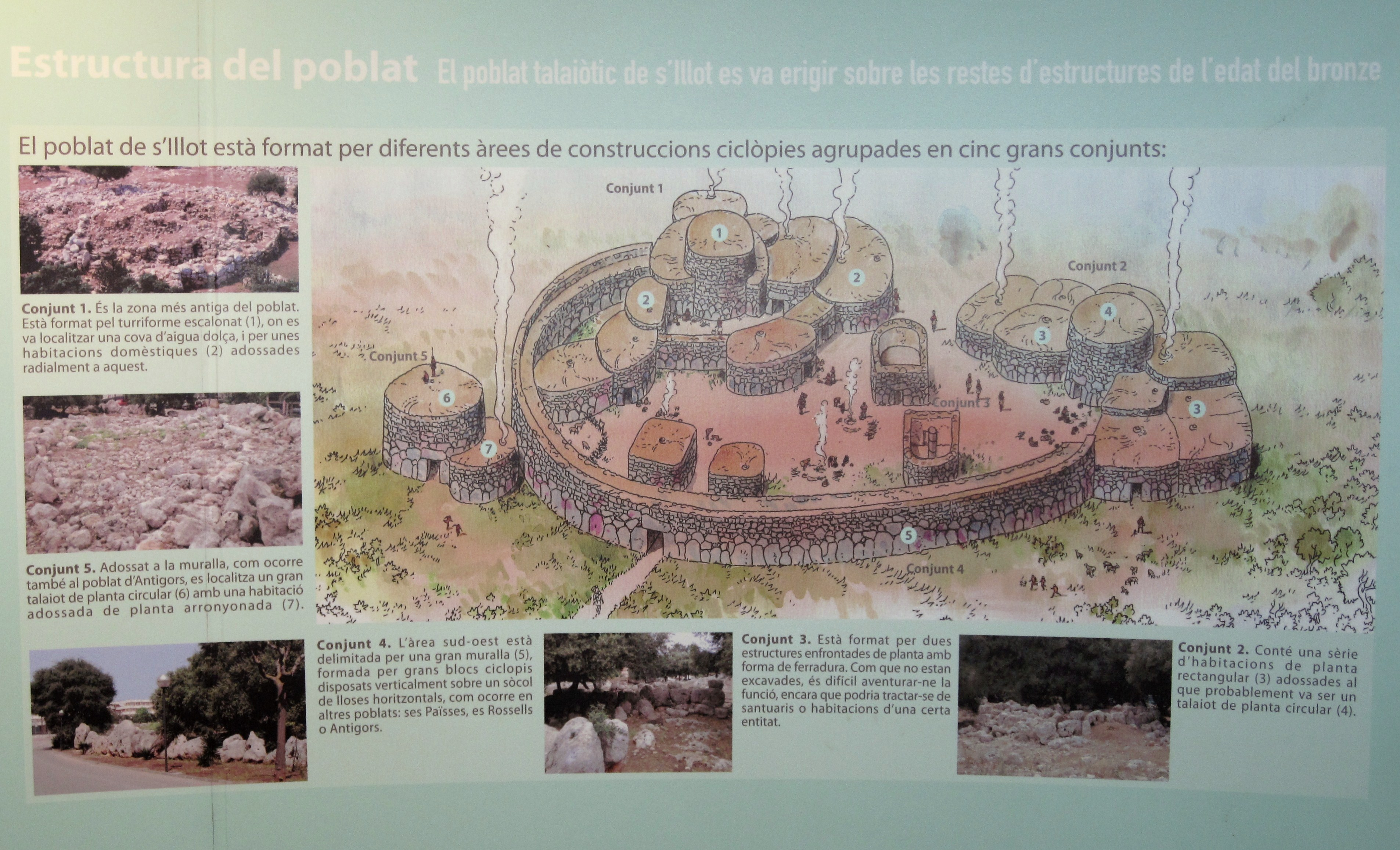 Rekonstruktionszeichnung des talaiotischen Dorfes von S’Illot (Poblat talaiòtic de s’Illot) im angrenzenden Besucherzentrum, Gemeinde Sant Llorenç des Cardassar, Mallorca, Spanien